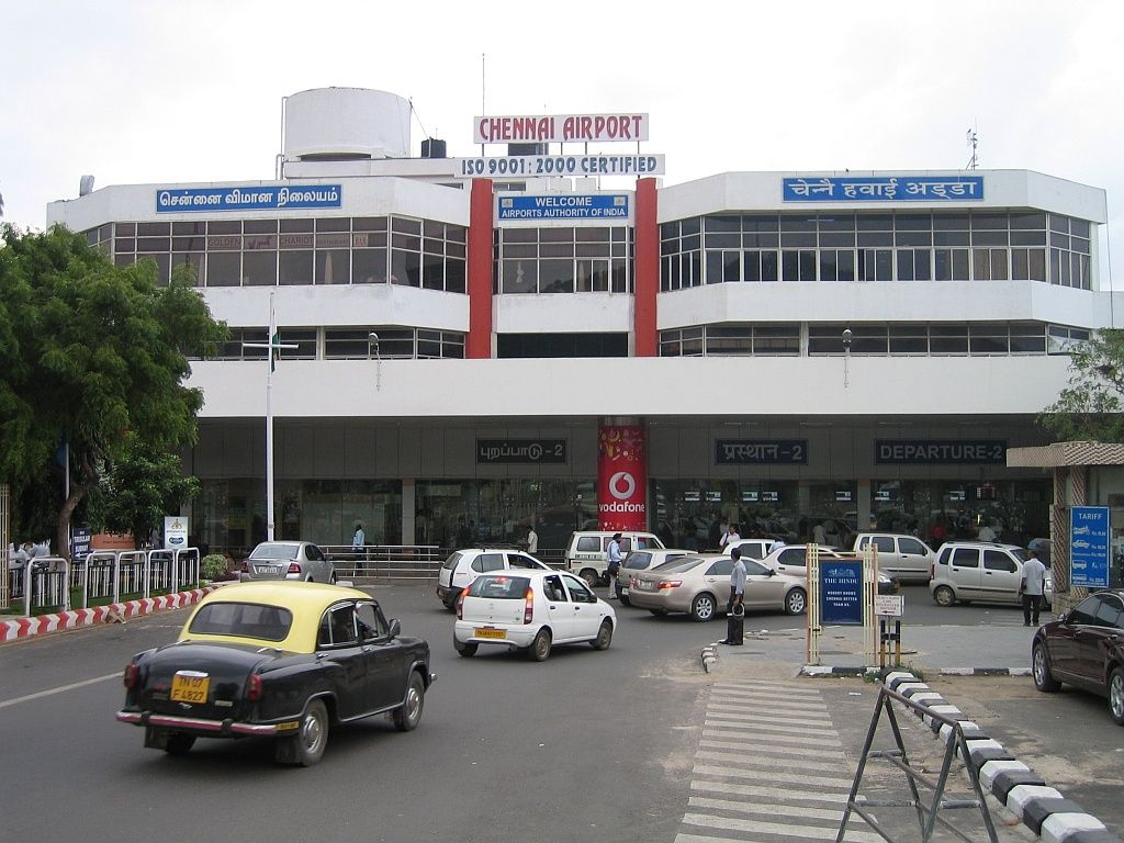 Flughafen Chennai - Inlandsterminal